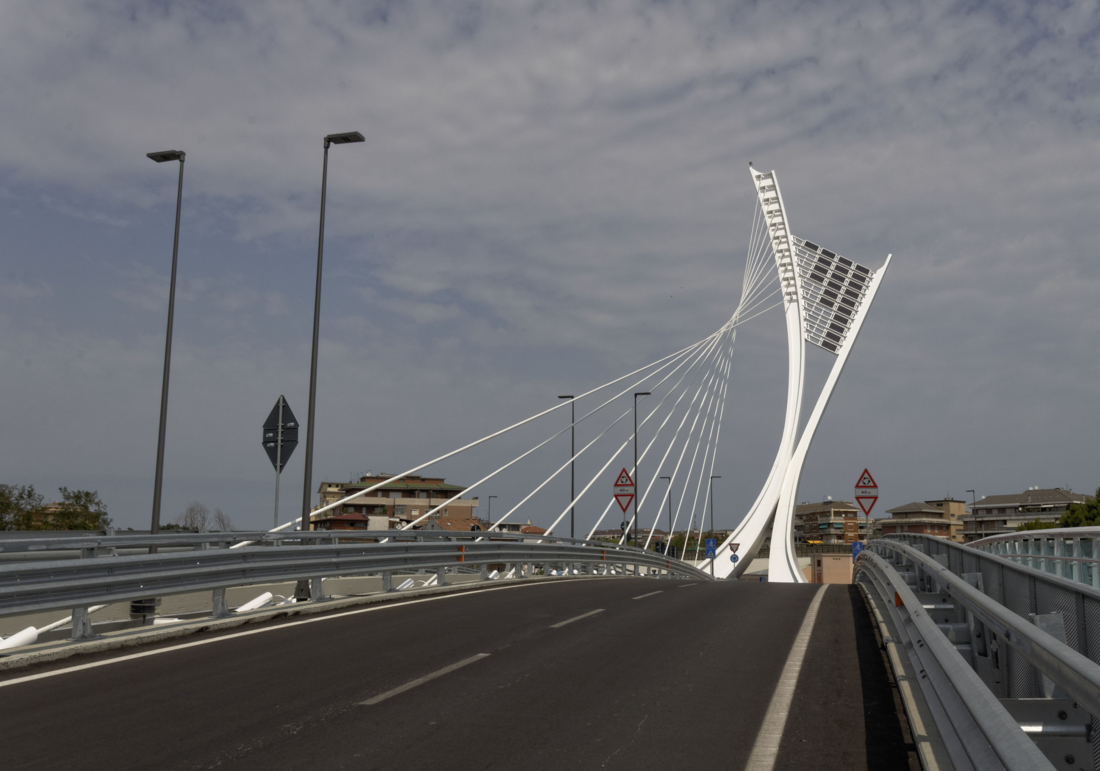 Pescara -Ponte Flaiano- 2017